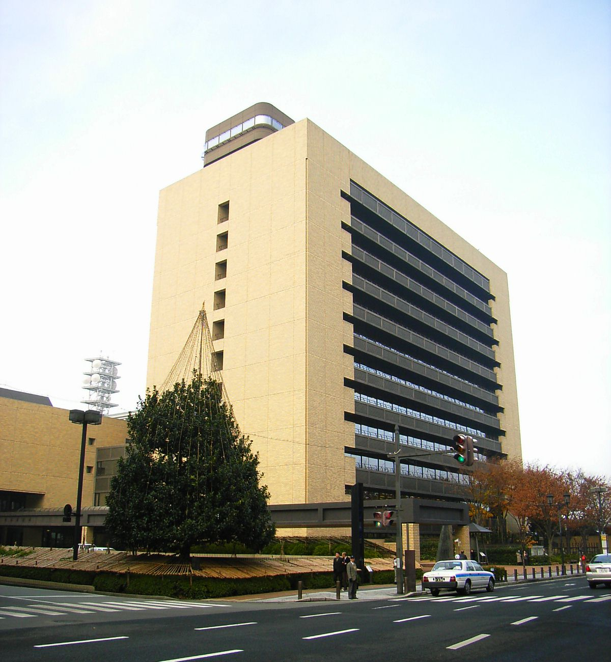 Yamagata City Office. Yamagata, Yamagata prefecture, Japan.